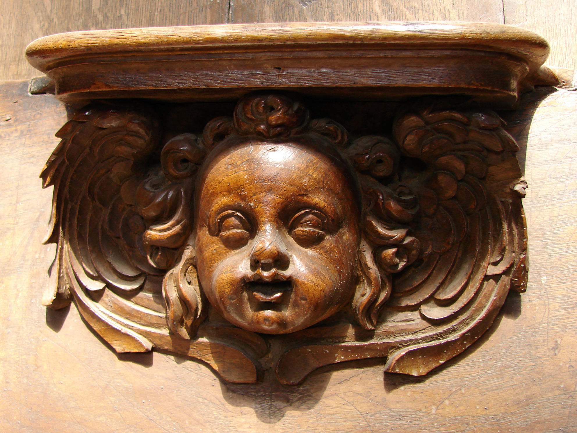 Stalles de la cathédrale Saint-Etienne de Meaux. Détail: une miséricorde.